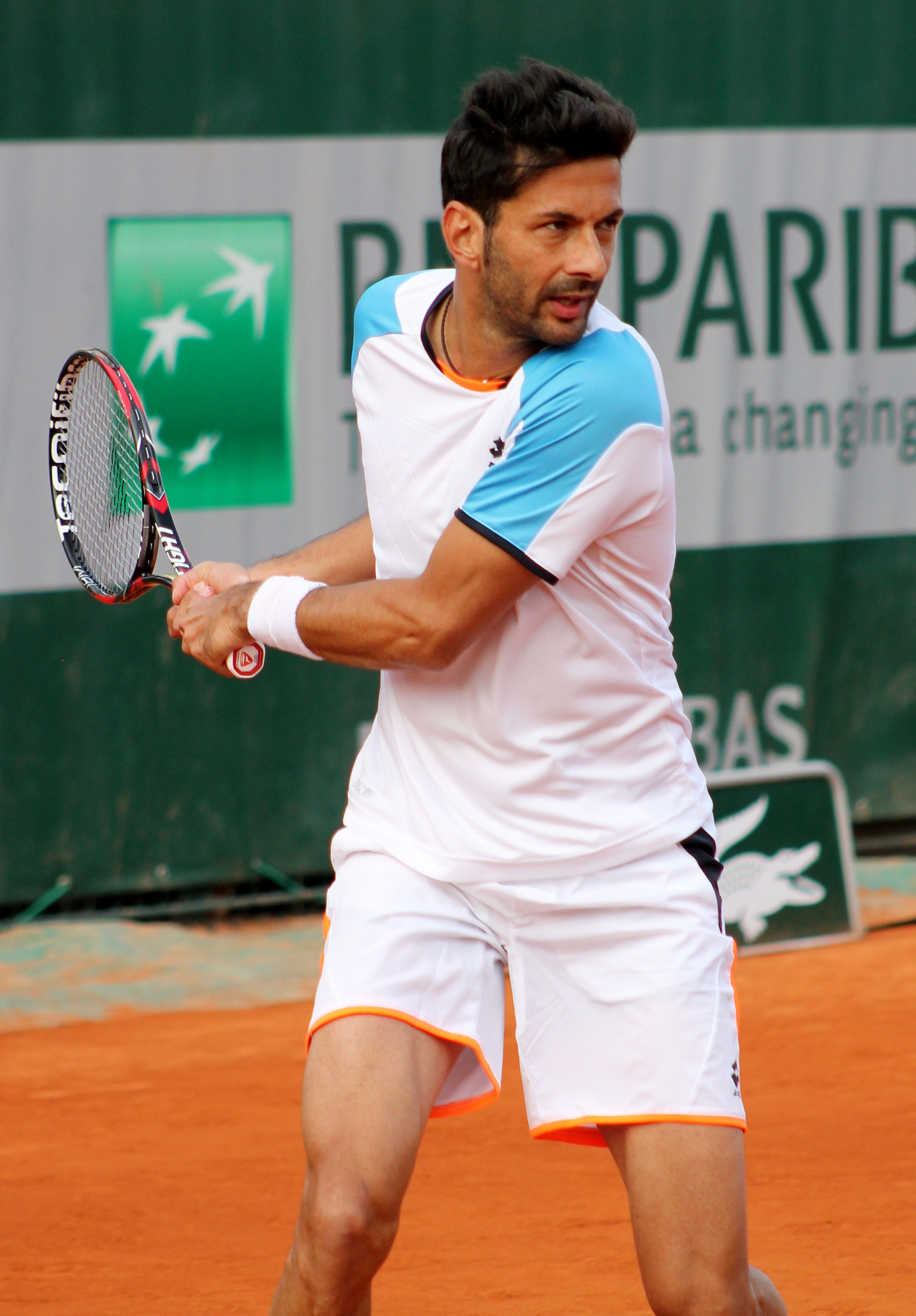 Knowle RG13 (5)